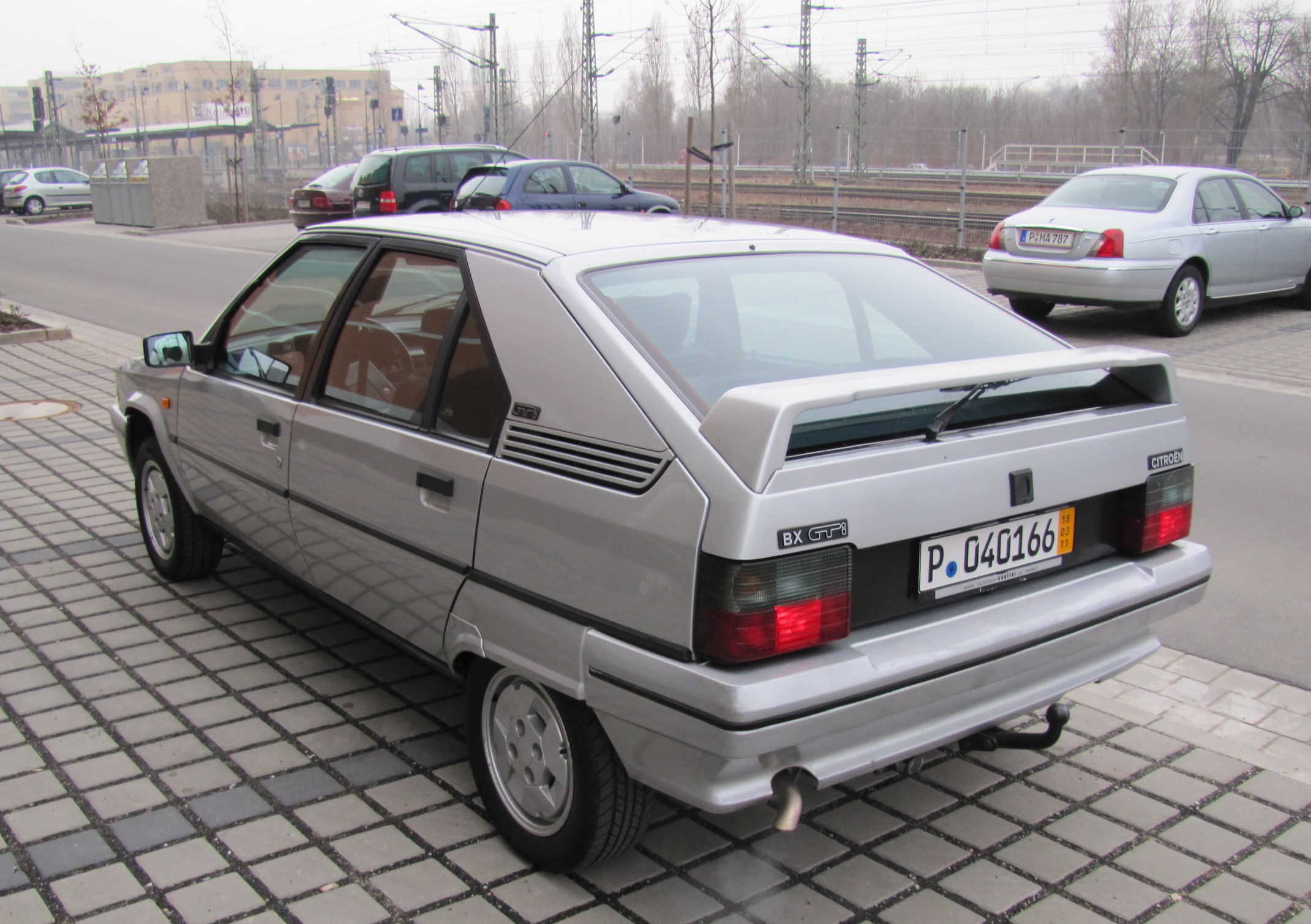 Citroen BX 19 GTi, Bj. 1990